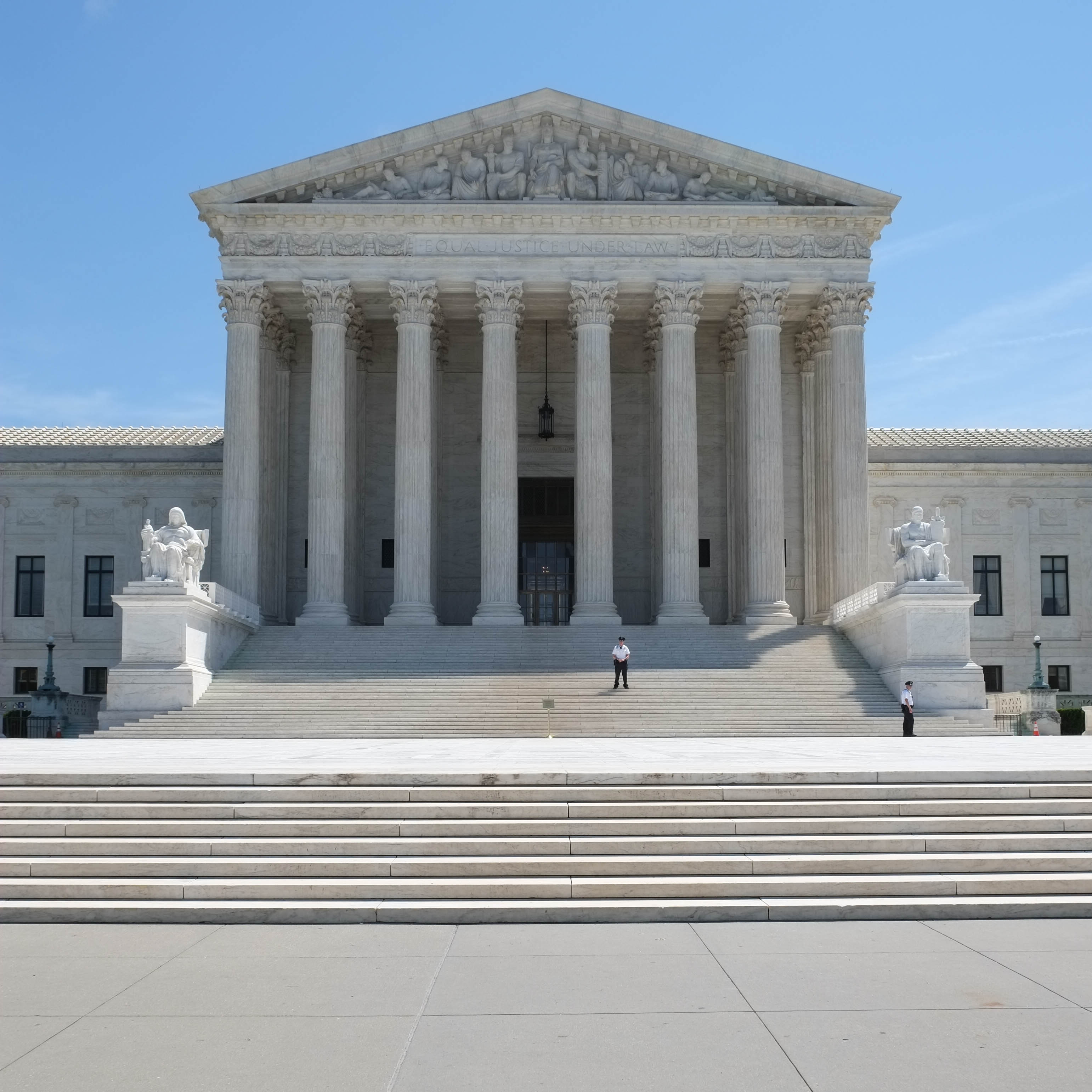 Supreme Court